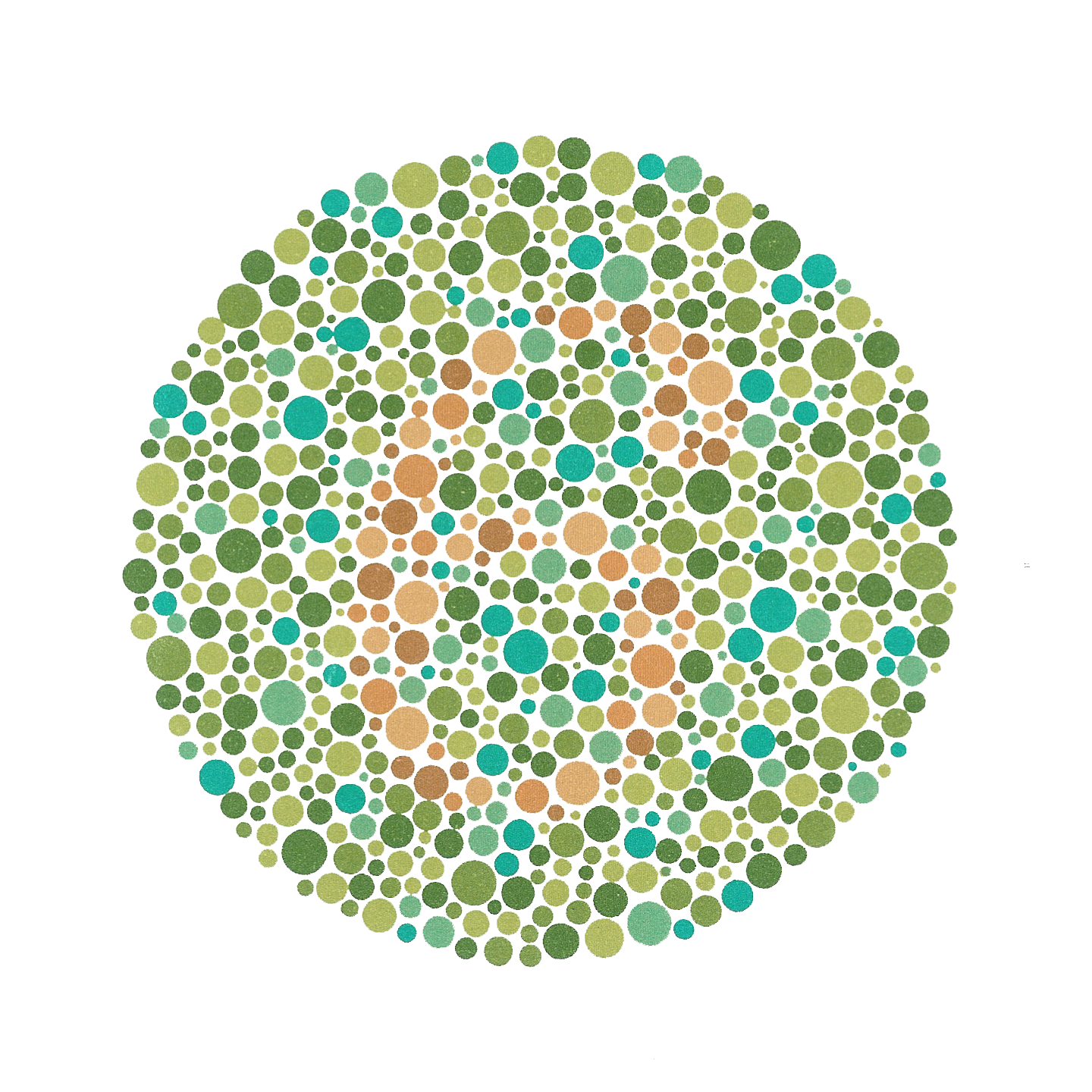 Ishihara Plate 11